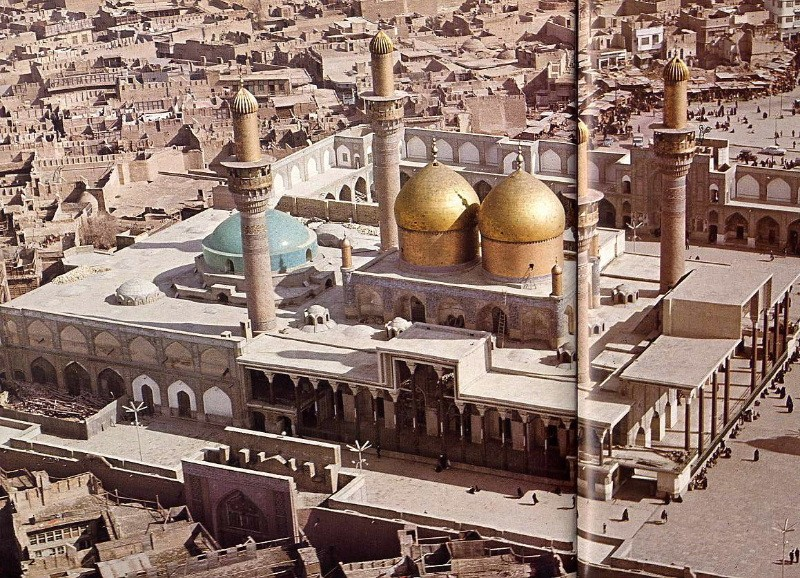 Kadhima mosq, Bagdhad, Iraq